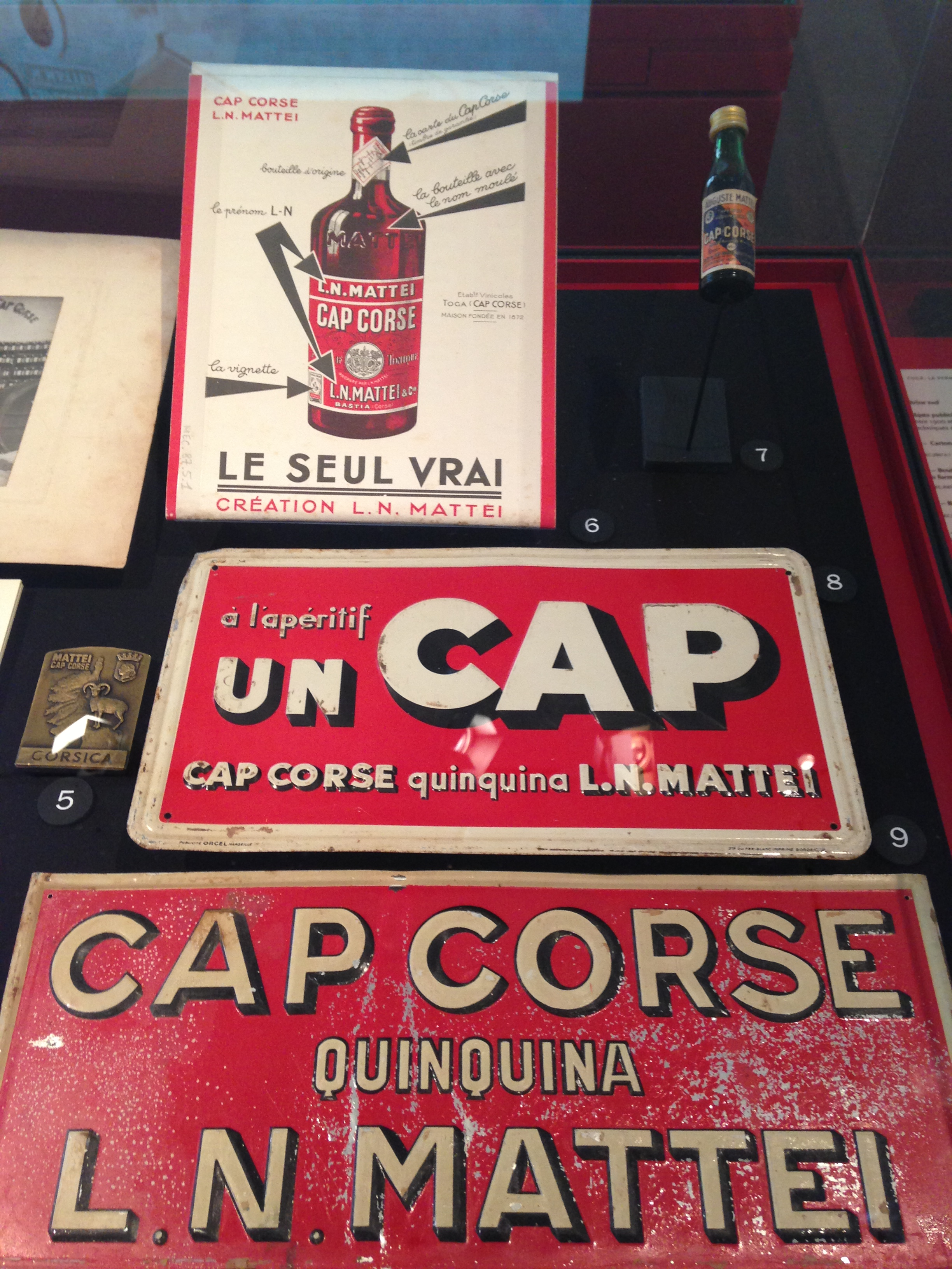 Objets publicitaires "Cap Corse Mattei" au musée d'ethnologie de Bastia